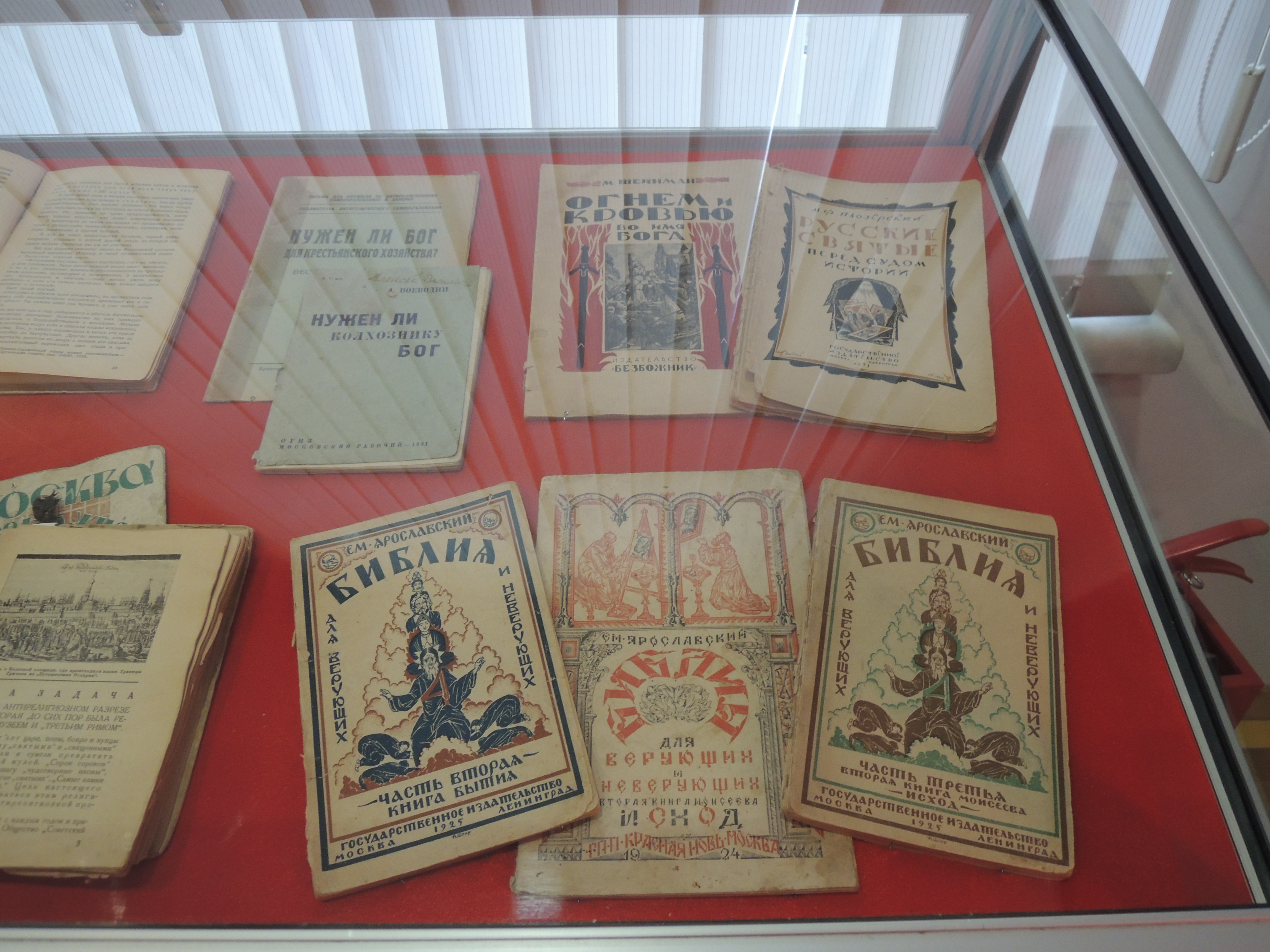 Выставка «Преодоление: Русская Церковь и Советская власть» в Государственном центральном музее современной истории России в Москве, 2012